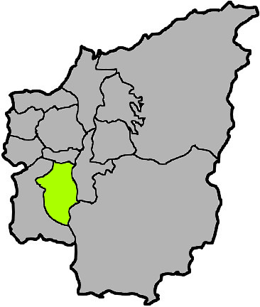 南投縣鹿谷鄉。